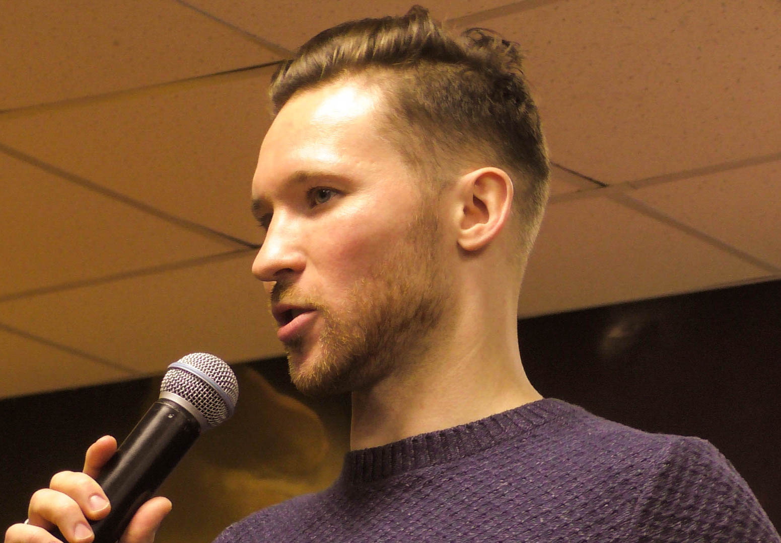 Сергей Карякин - чемпион мира по современному пятиборью.